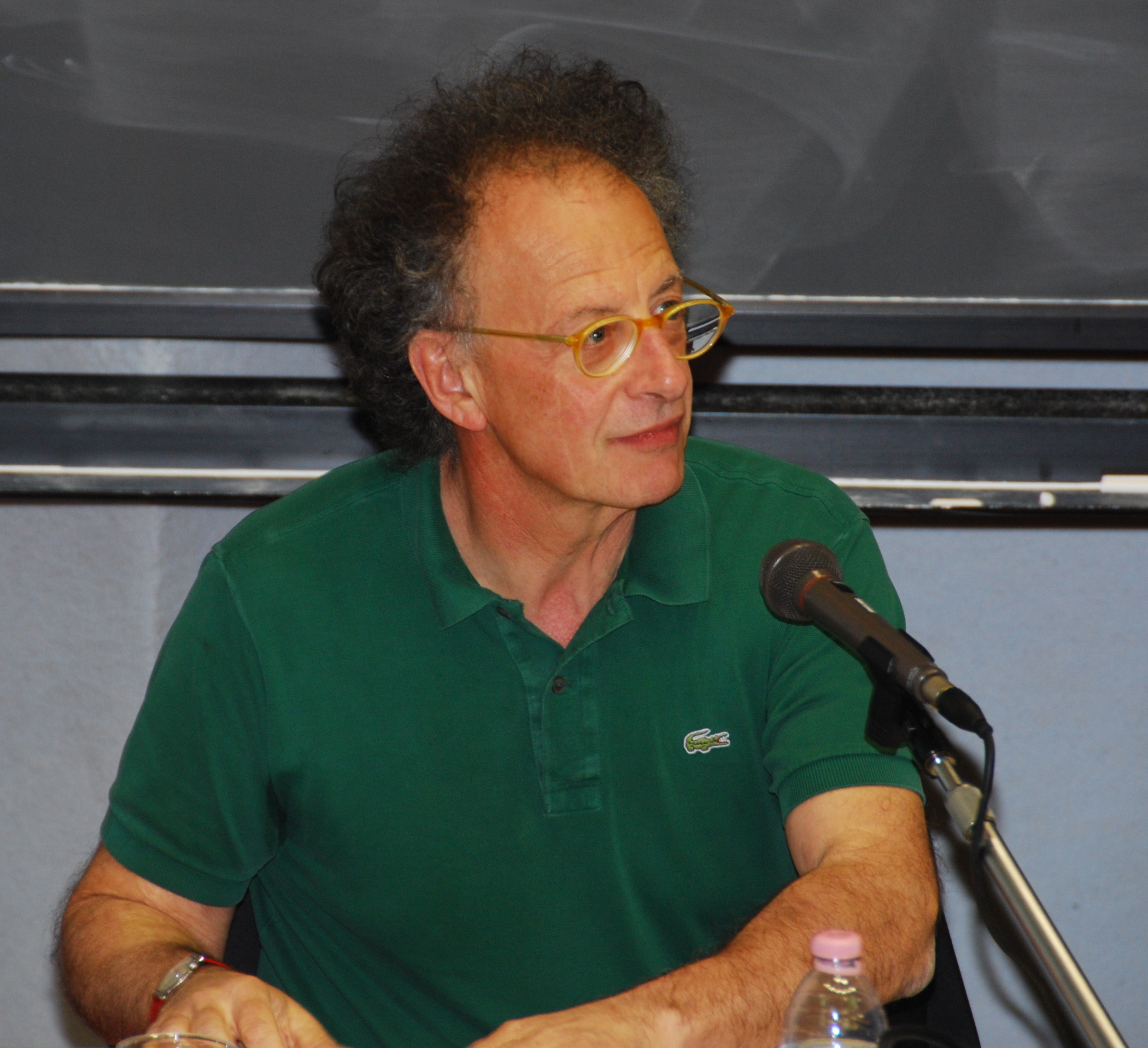 Gherardo Colombo, ex magistrato italiano, durante una conferenza a Trento